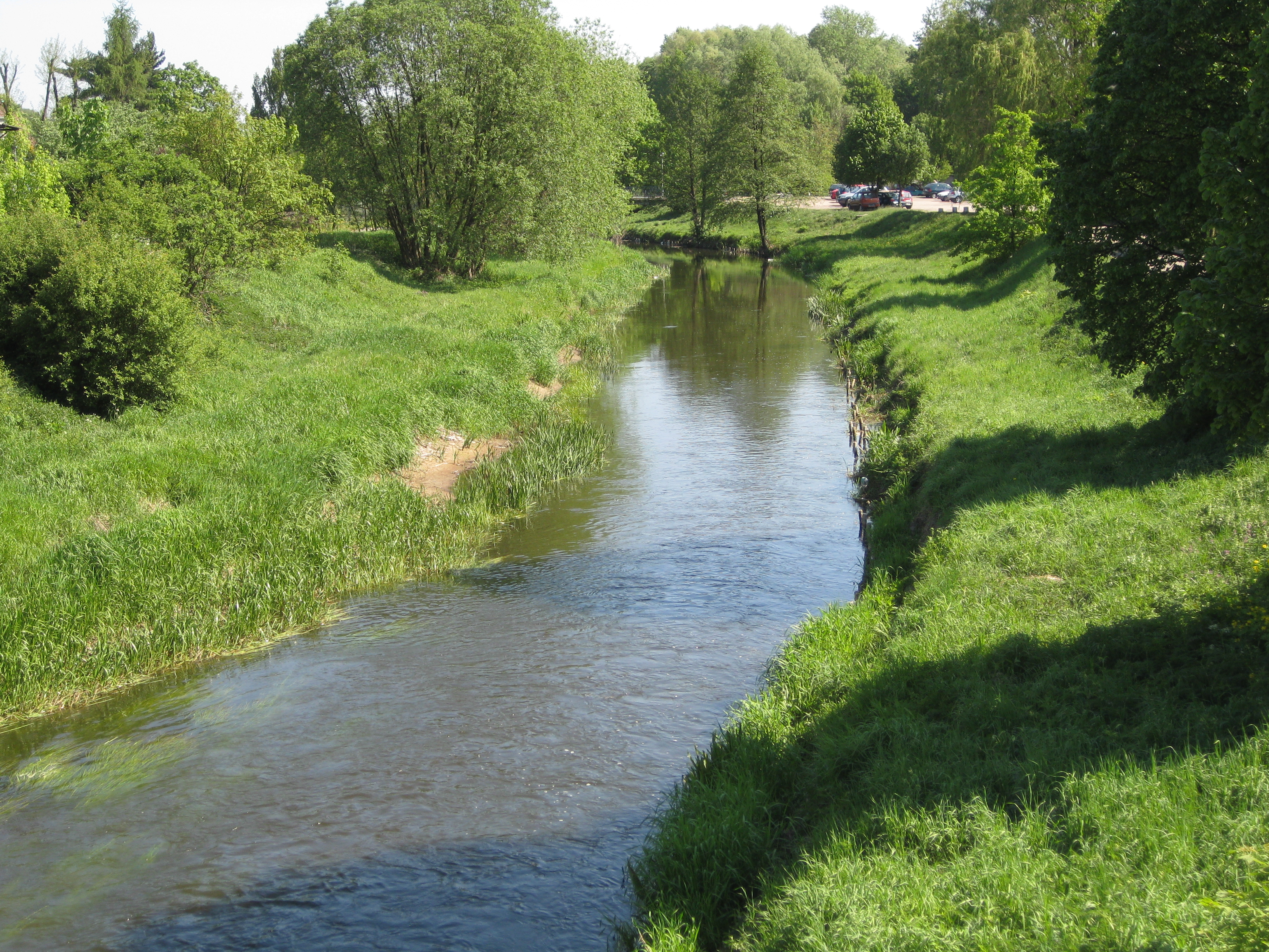 Kanał Mosiński